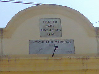 Pavajon